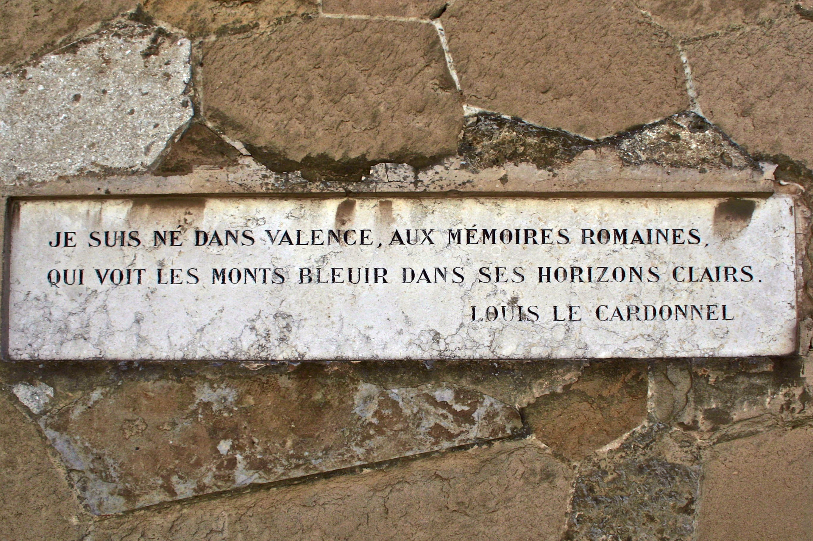 Valence (Drôme, France), citation de Louis Le Cardonnel, place des Ormeaux.